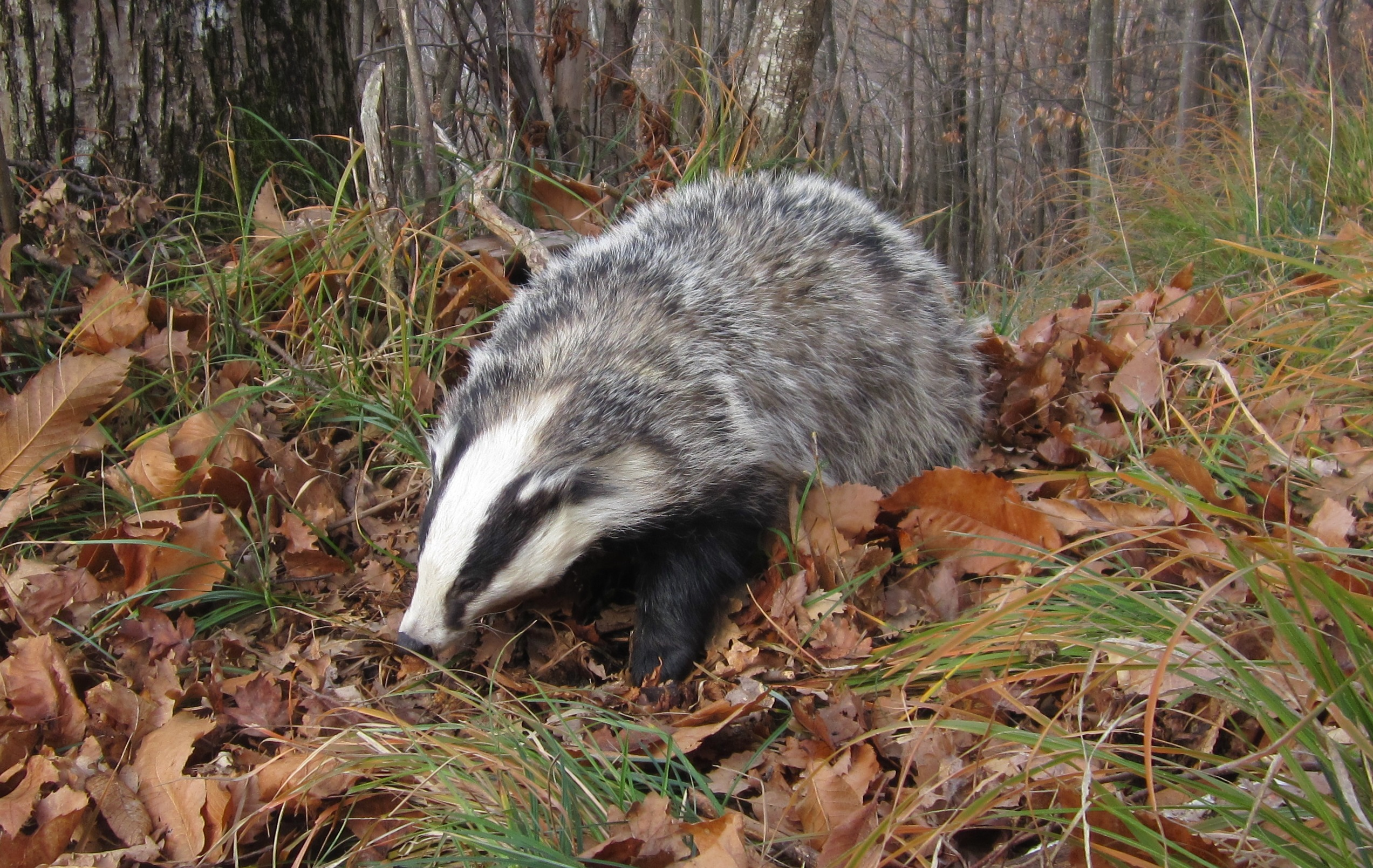 Esemplare di tasso, specie molto comune in quest'area naturalistica